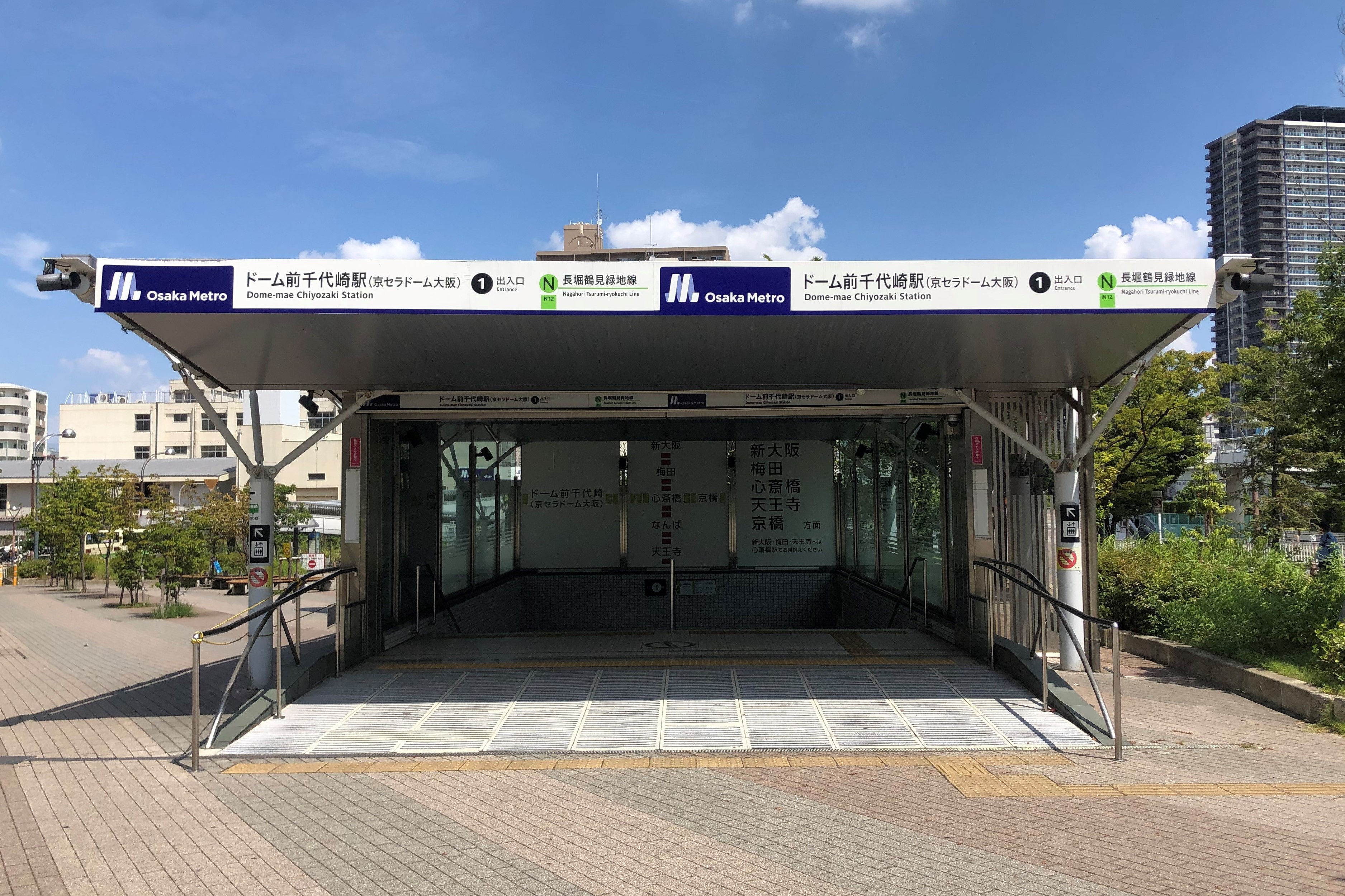 Osaka Metro ドーム前千代崎駅